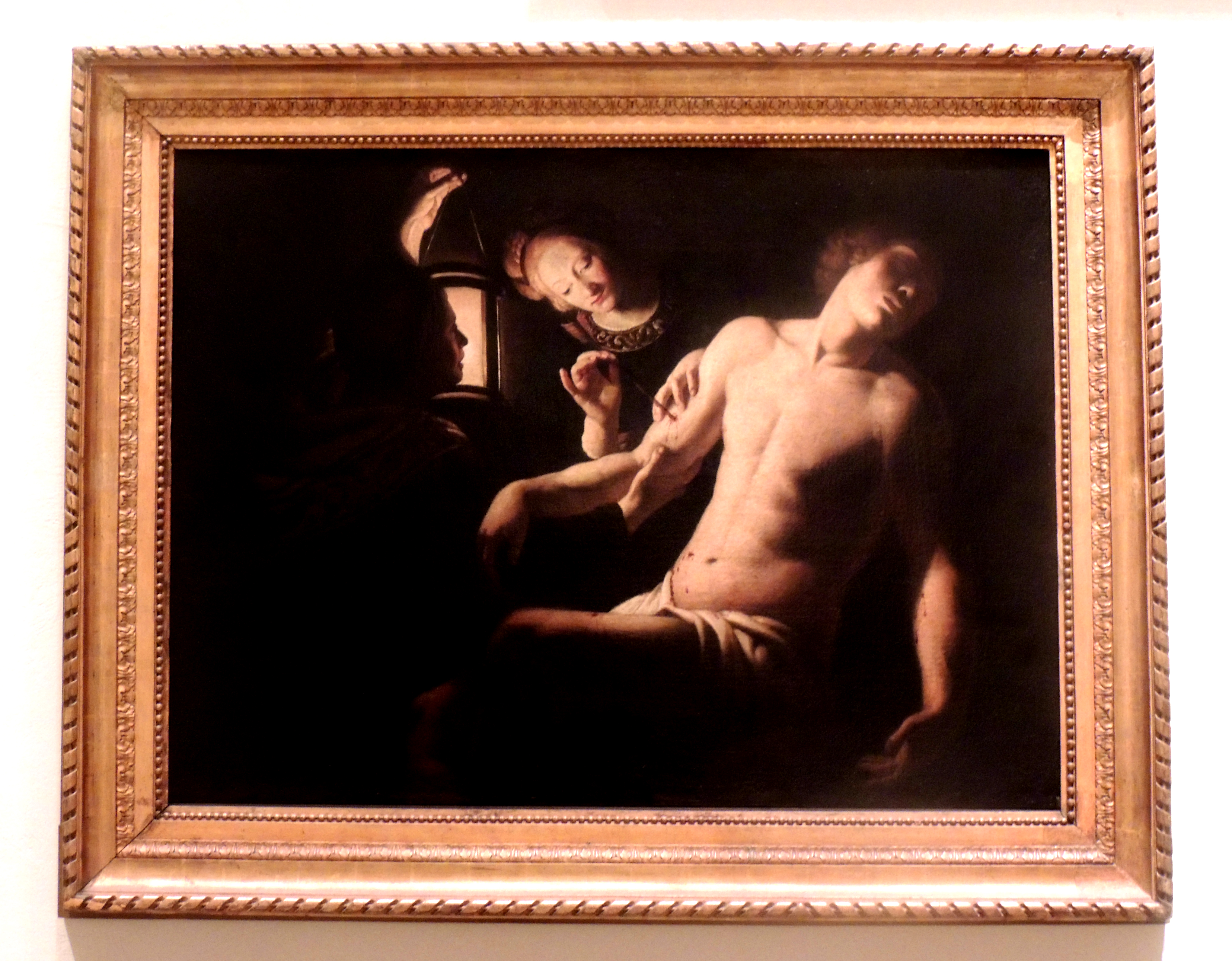 Photo de l'oeuvre " Saint Sebastien soigné par Sainte Irène " de Trophime Bigot , prise le 14 février 2015 à la Pinacothèque des musées du Vatican (Rome, Italie)